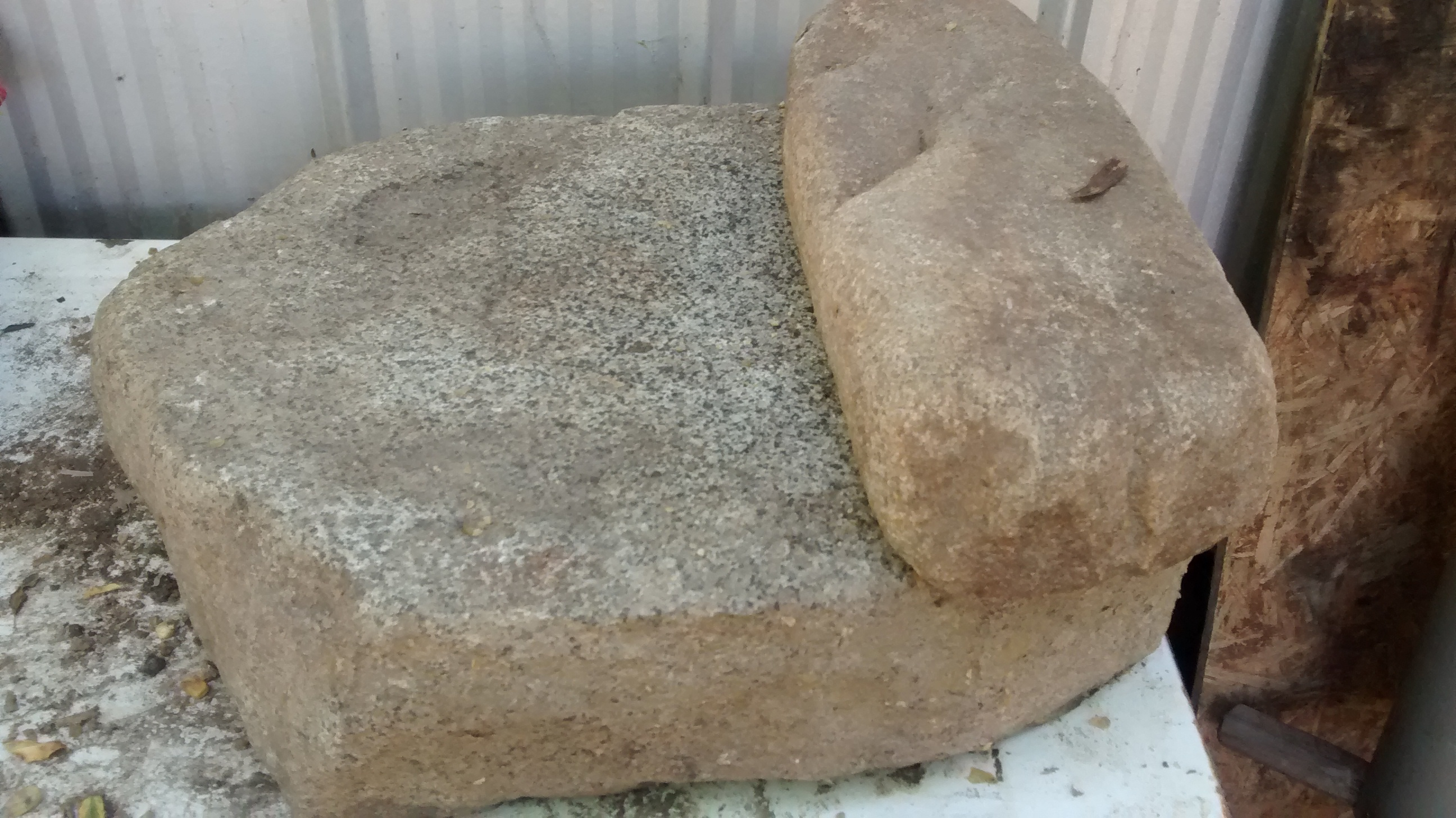 Molino manual, encontrado en la localidad de Carrizal del Maule, San Javier de Loncomilla, Chile. Era aún usado ( en la fecha de la fotografía) para moler mote y harina tostada por Lutgardi González